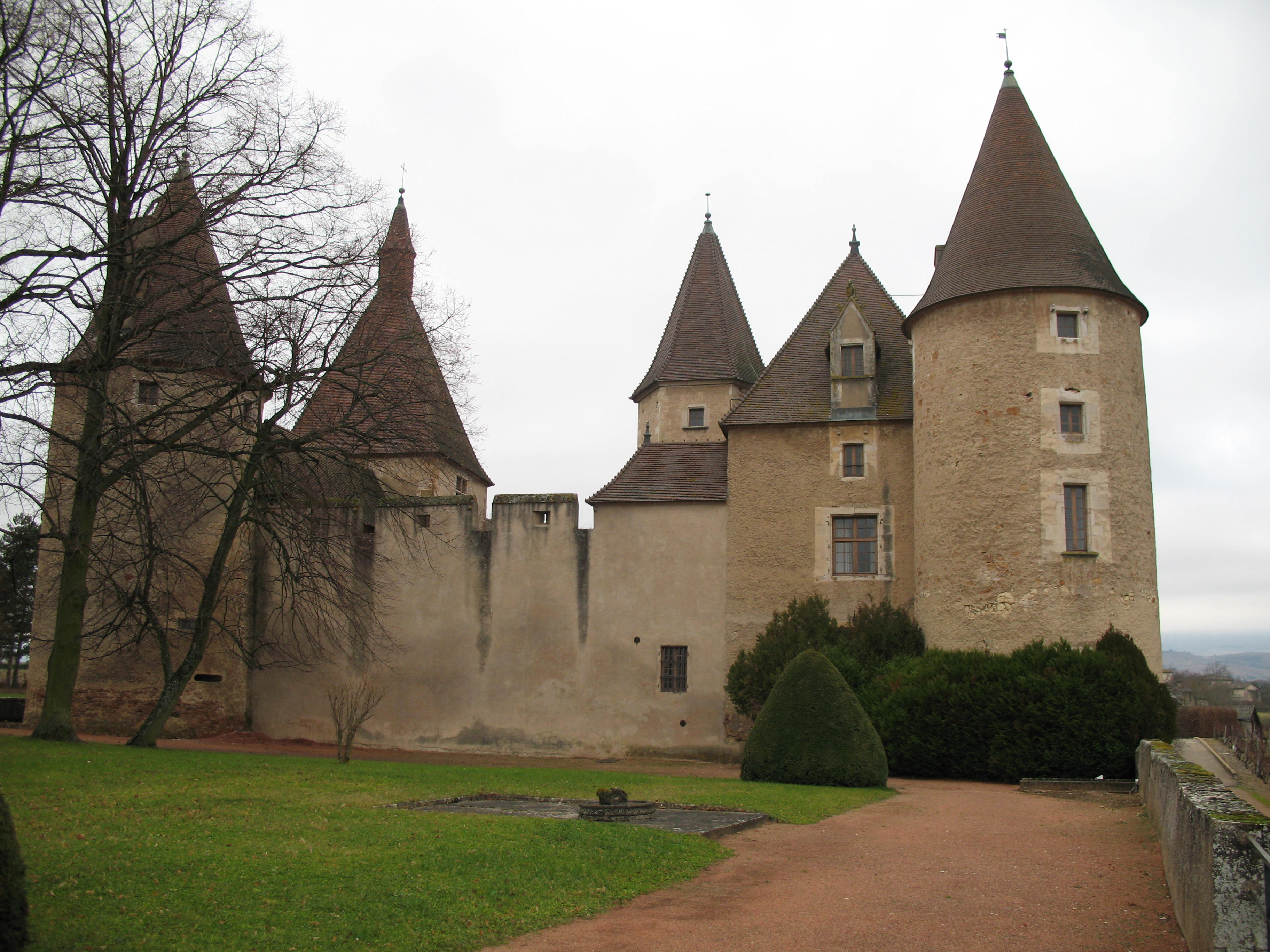 Château de Corcelles-en-Beaujolais dans le Rhône, côté est